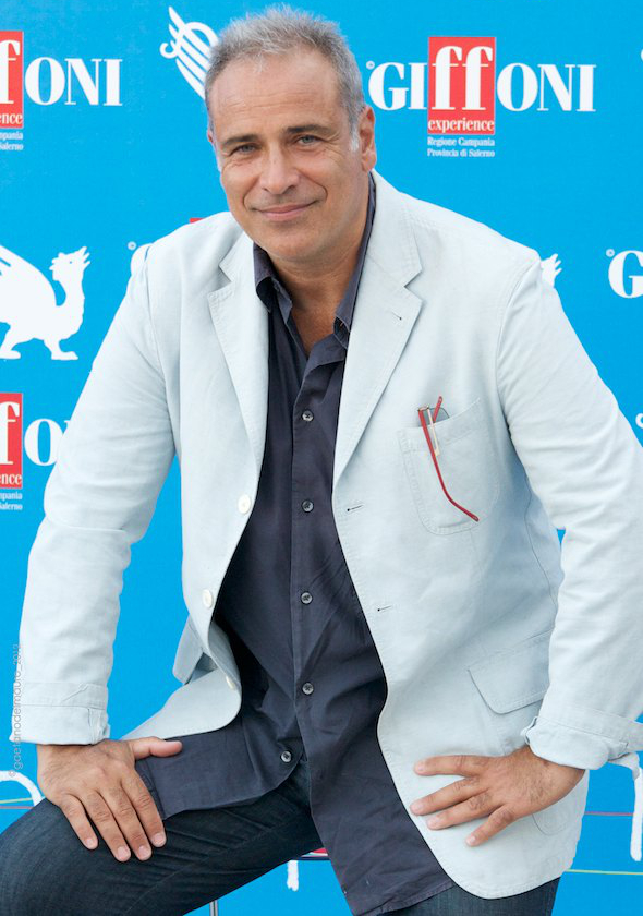 Enzo Decaro al Giffoni Film Festival 2012